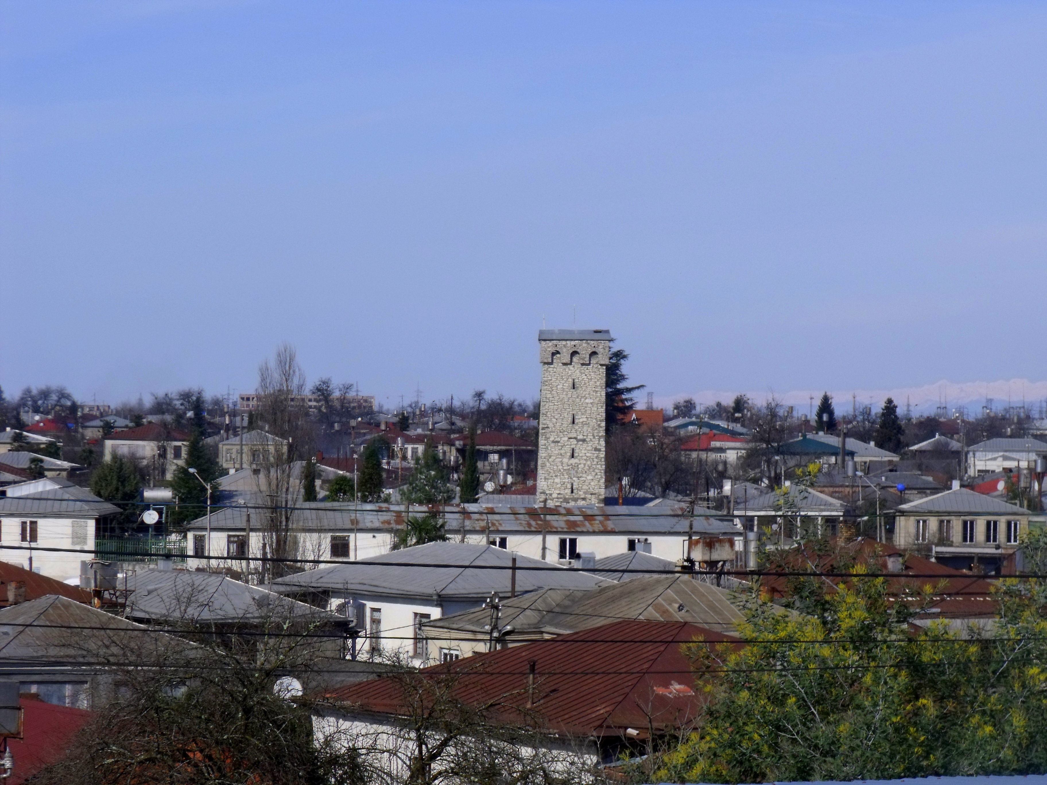 Zugdidi